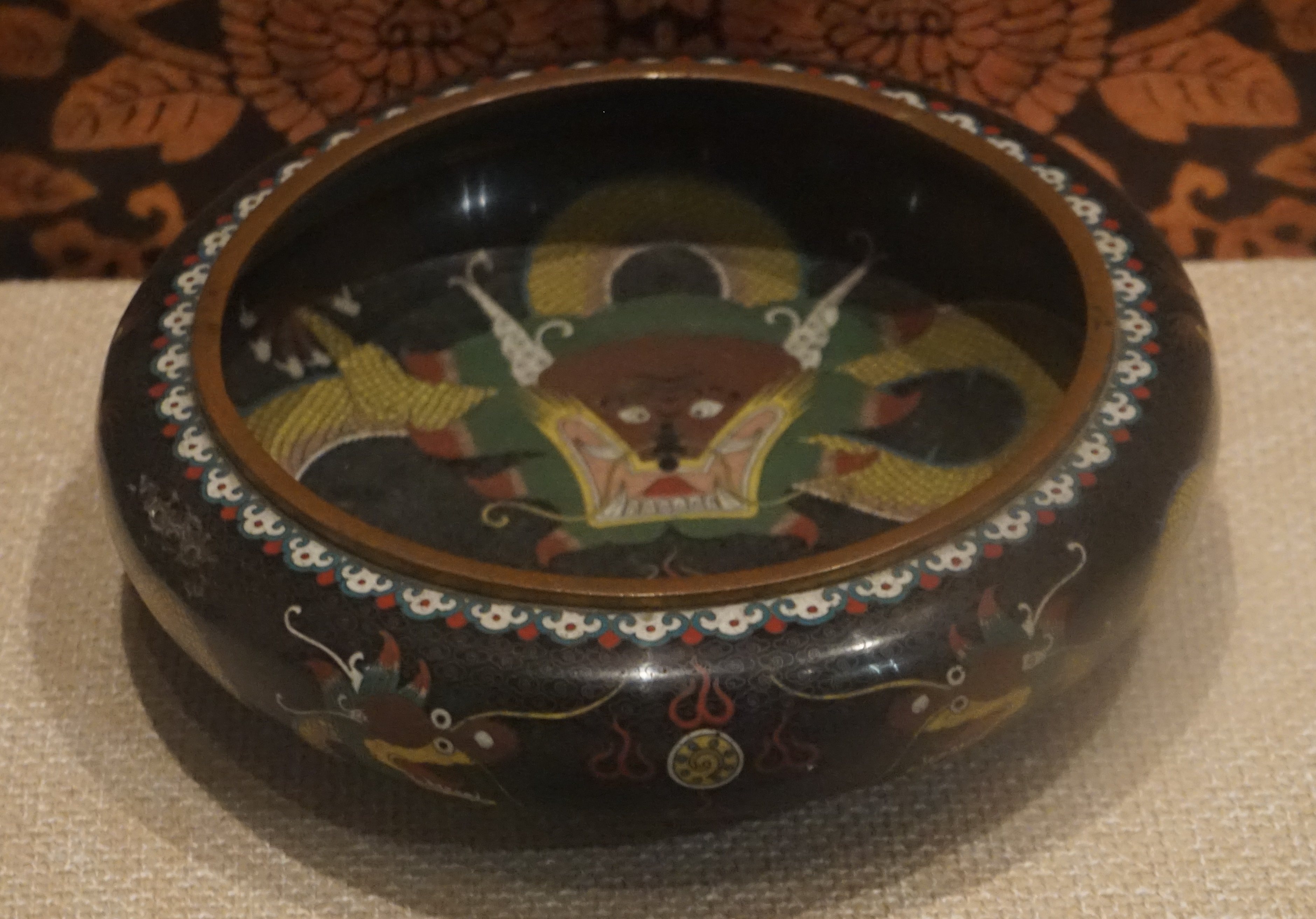 中文（中国大陆）: 景泰蓝钵，民国，市文管站旧藏，绥化市博物馆一楼。三级文物